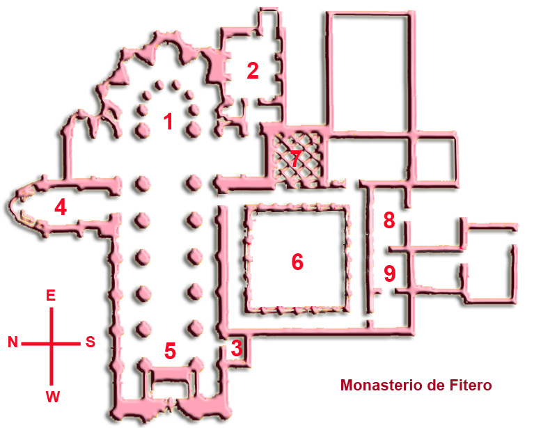 Planta del Monasterio de Fitero Navarra España